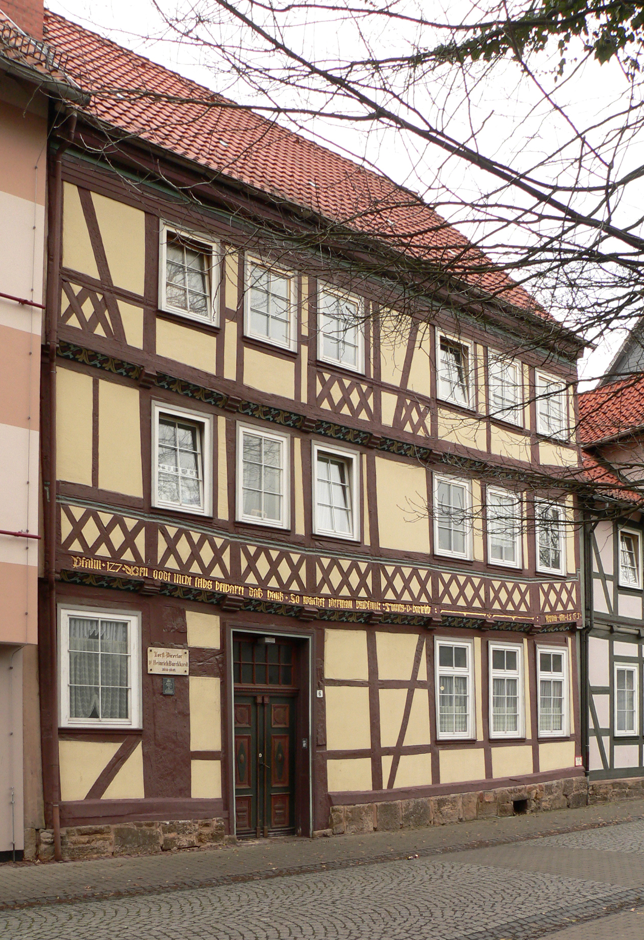 Wohnhaus von Heinrich Christian Burckhardt in Münden 1844-1849 in Fachwerkhaus von 1565, Aufschrift des Schildes "Forst-Direktor Dr. Heinrich Burckhardt 1844-1849"